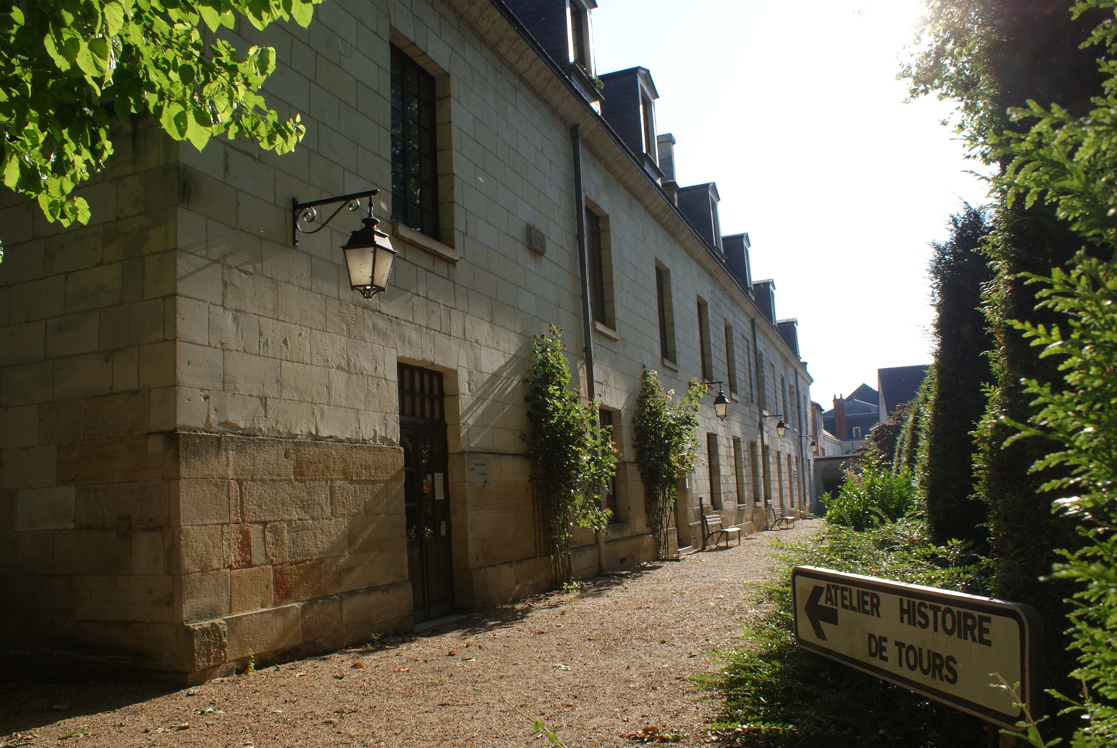 Logis des Gouverneurs au château de Tours (côté place des Turones). Entrées de l'Atelier d'histoire et de la bibliothèque d'étude de la société Archéologique de Touraine